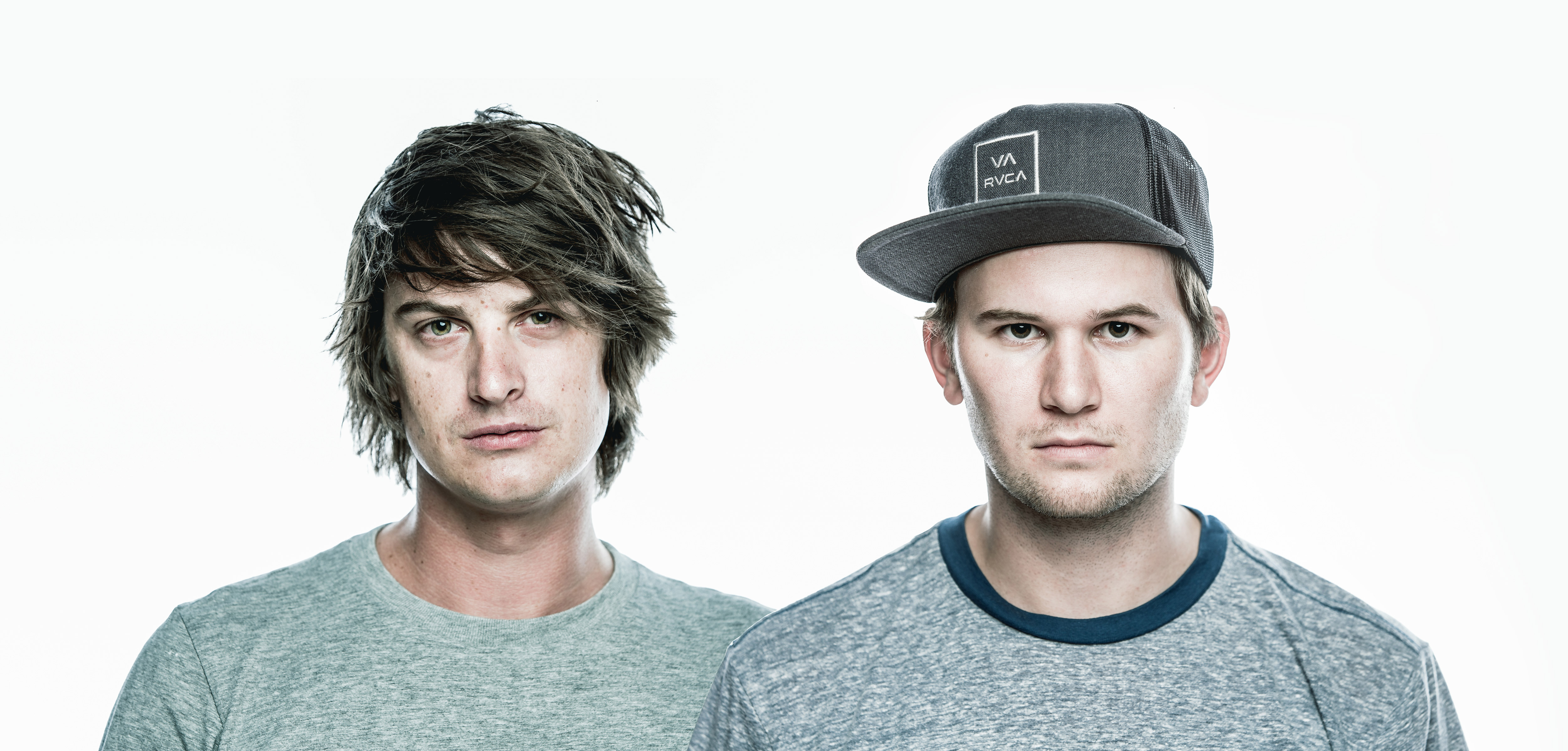 Camo&Krooked - press pic 2013